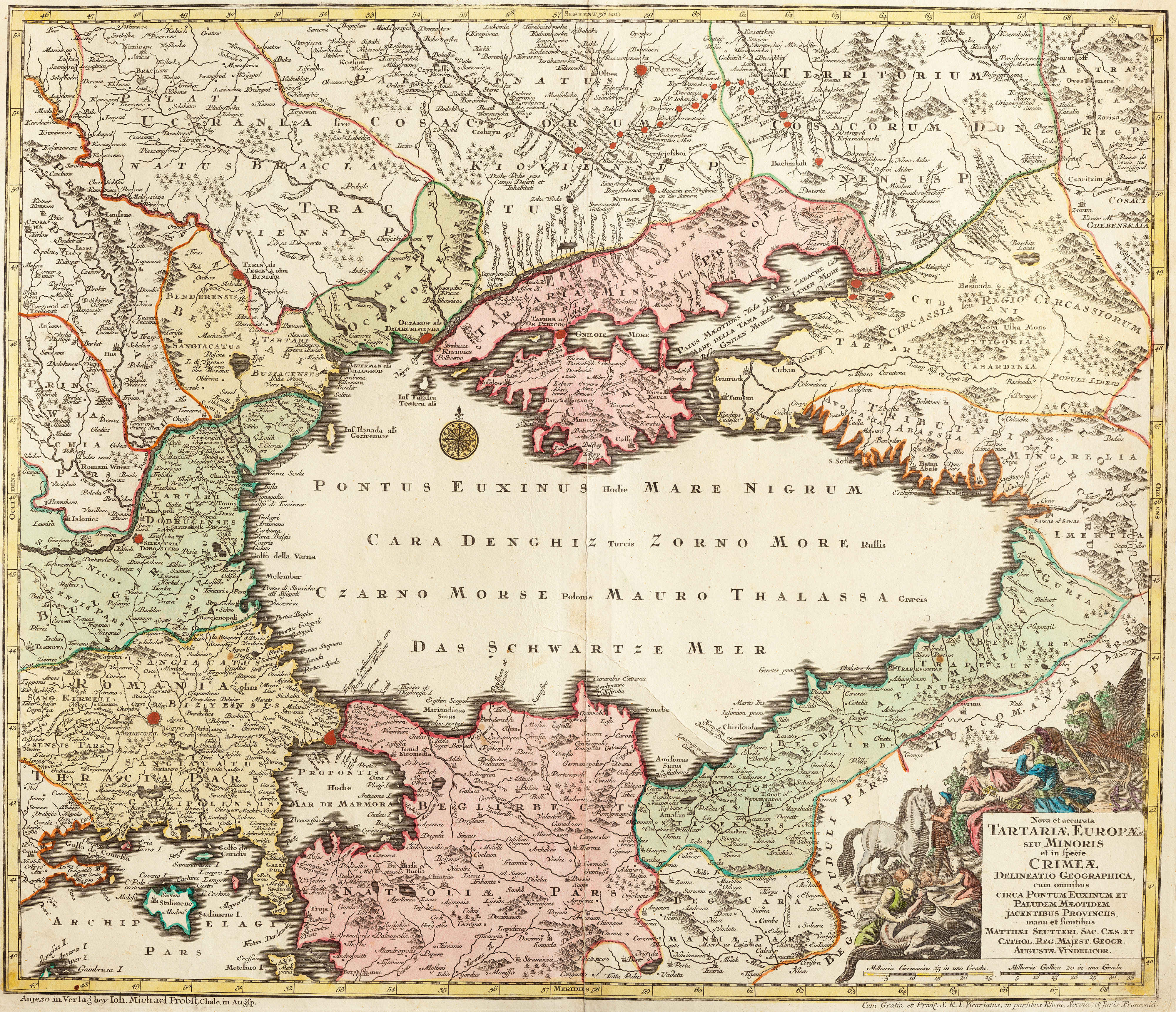 Мала татарія, Україна - держава козаків.